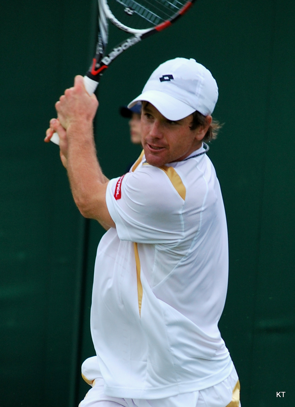 Blaz Kavcic